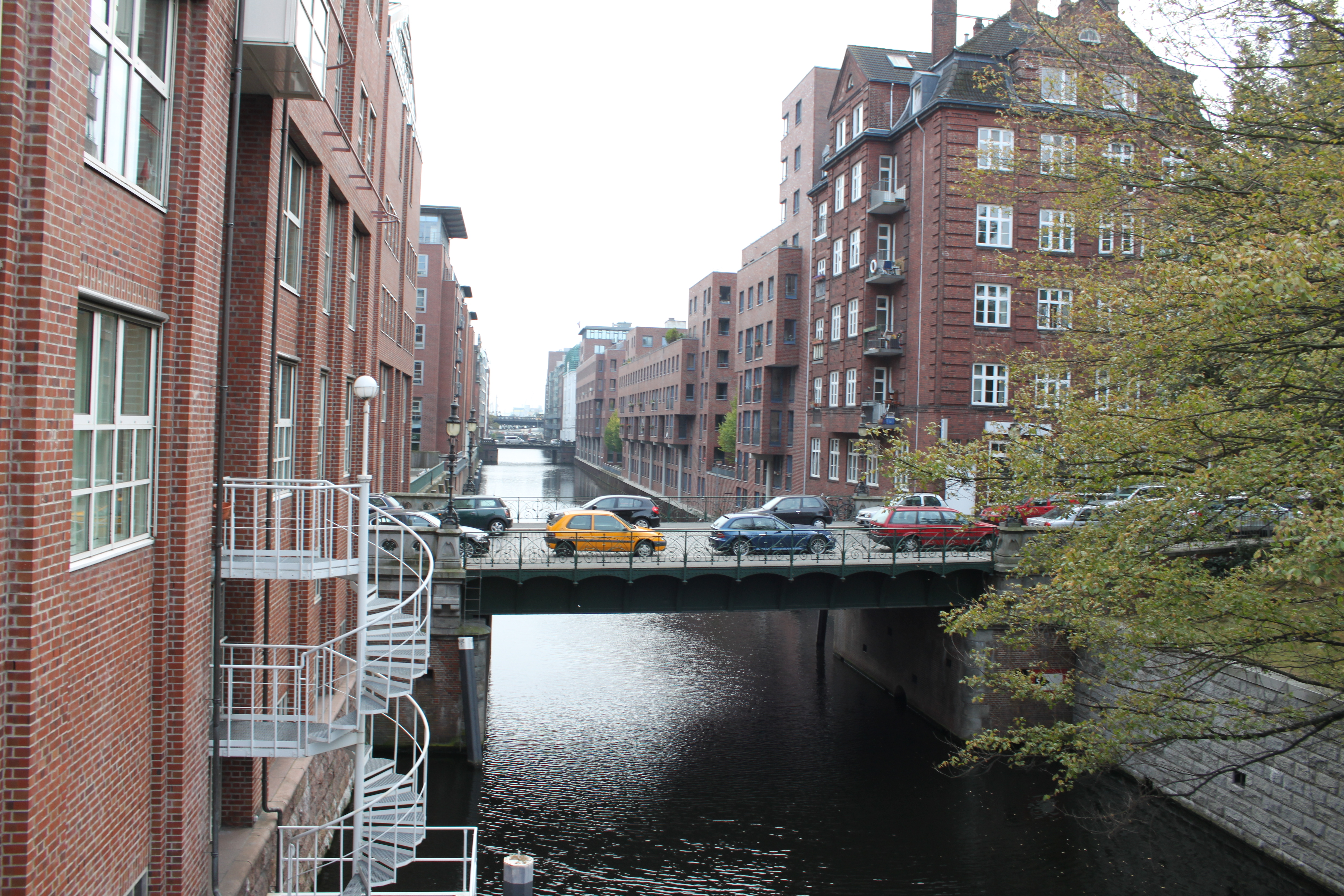 Pulverturmsbrücke Hamburg